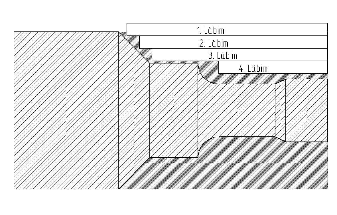 Koorivtöötluse läbimid